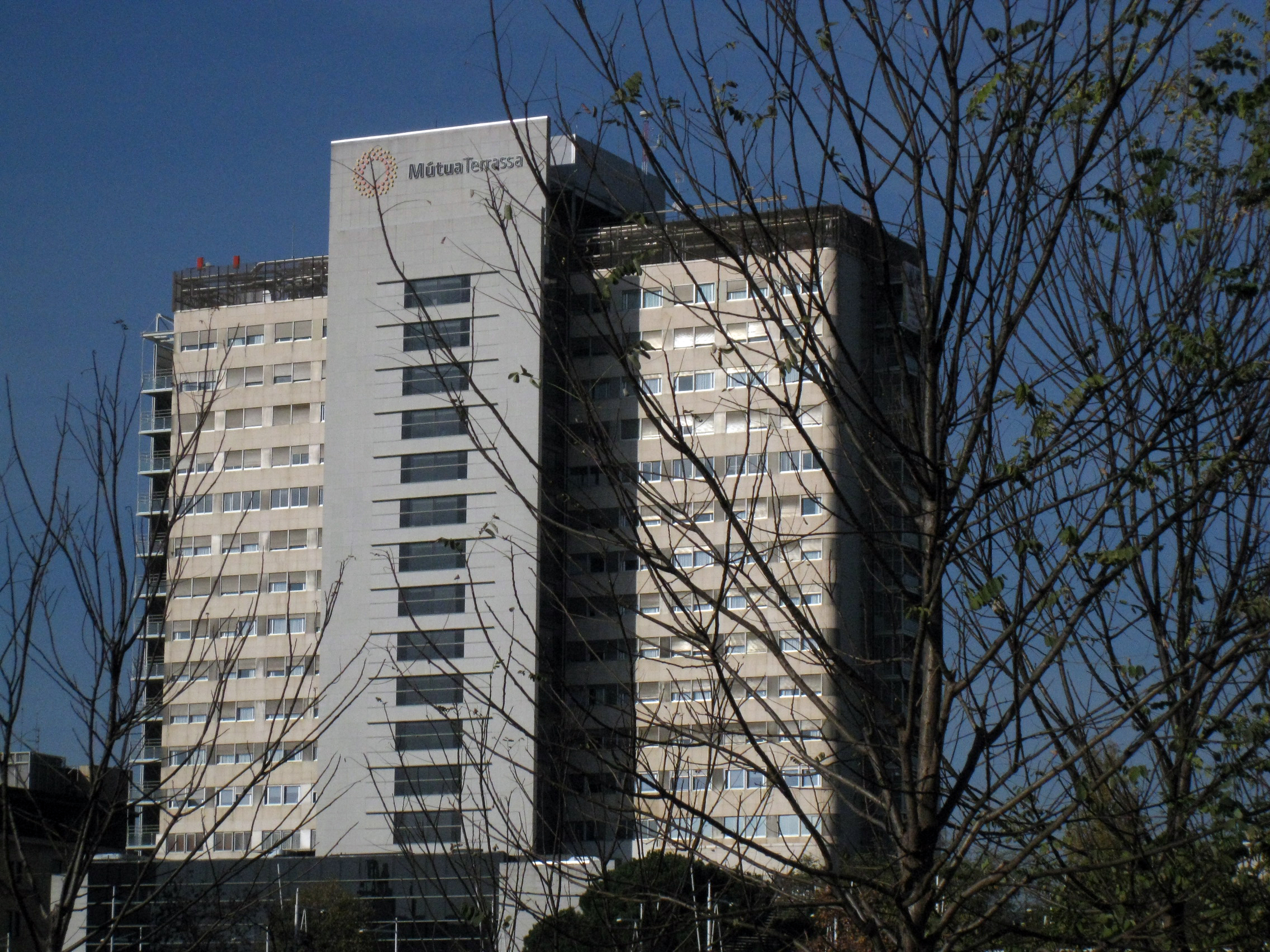 Mútua de Terrassa, des del parc de Vallparadís